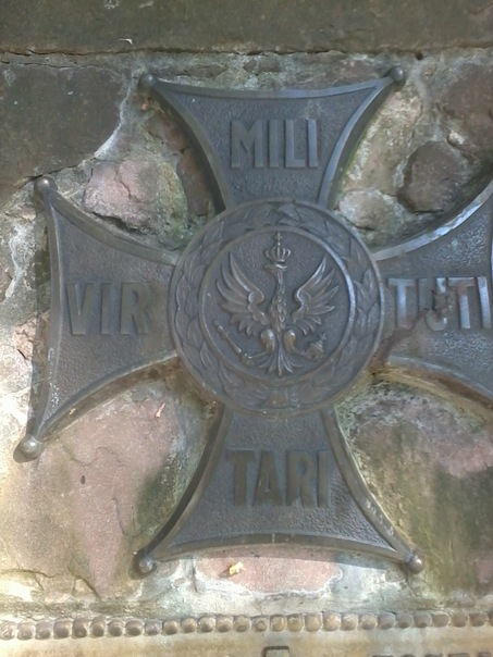 Зображення ордена на пам"ятнику загиблим у двох світових війнах. Івано-Франківськ. Меморіальний сквер.